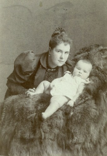 Ольга Николаевна Звегинцова, ур. Сталь-фон-Гольштейн (1869—1938) с дочерью Ольгой (1892—1987; в замужестве Гендрикова).